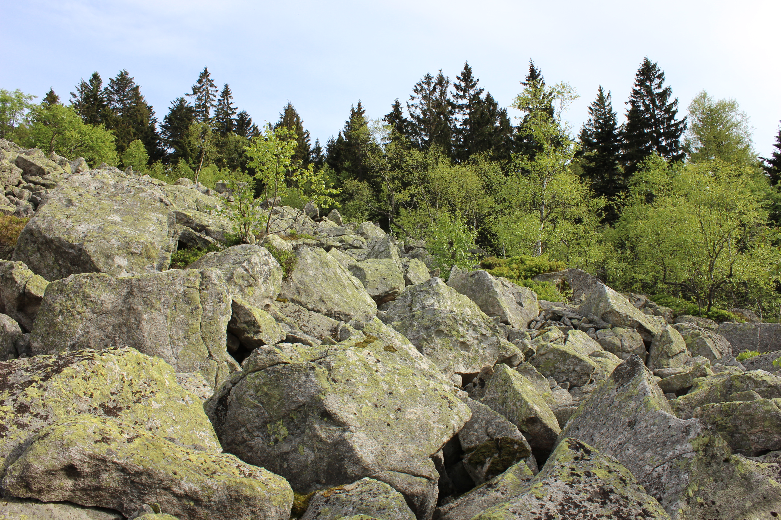 Blockmeer auf der Käsplatte. Die Käsplatte liegt im Gemeindebereich von Sankt Englmar und gehört zu den Geotopen im Landkreis Straubing-Bogen mit der Nr. 278R010